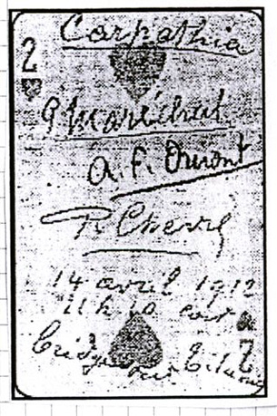 Spielkarte, die von drei Überlebenden der Titanic-Katastrophe auf der Carpathia signiert wurde